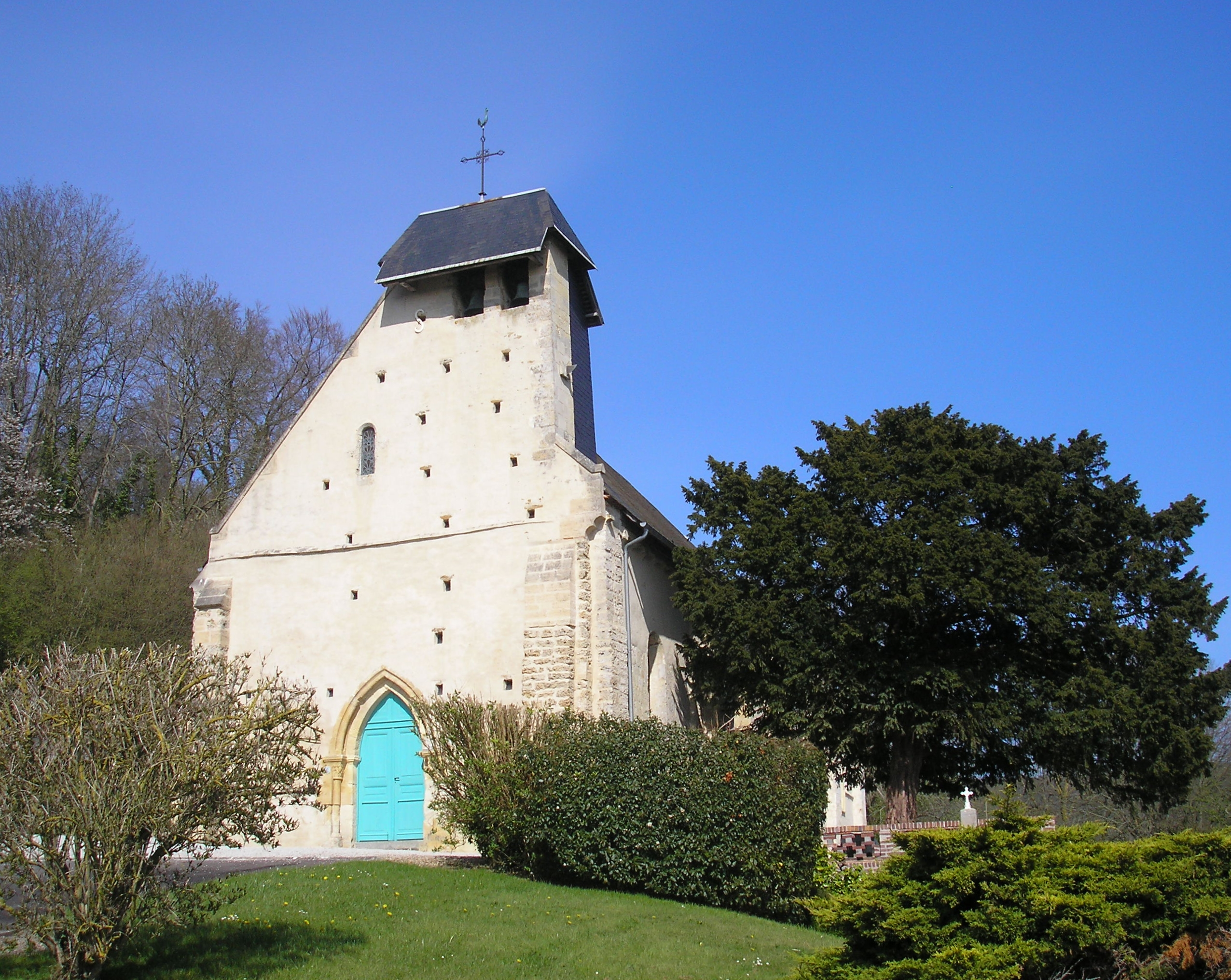 Grangues (Normandie, France). L'église Notre-Dame.